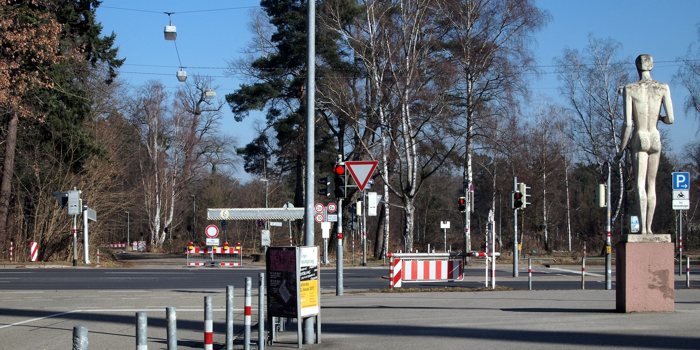 Zahlreiche Verkehrszeichen beim Birkenparkplatz am Adenauerring beim Wildparkstadion in Karlsruhe.